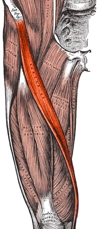 Sartorius muscle